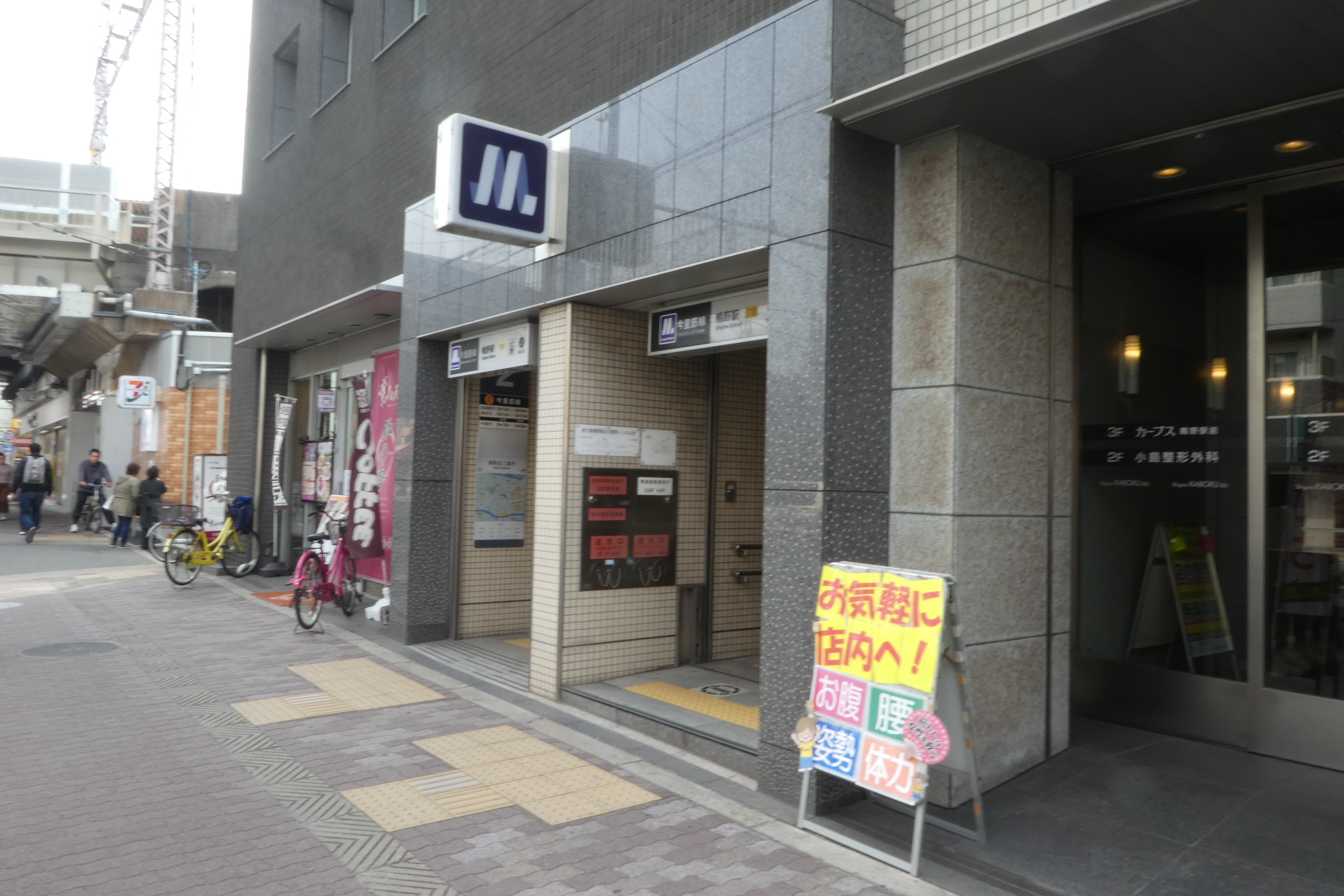 Osaka Metro鴫野駅、2号出口。